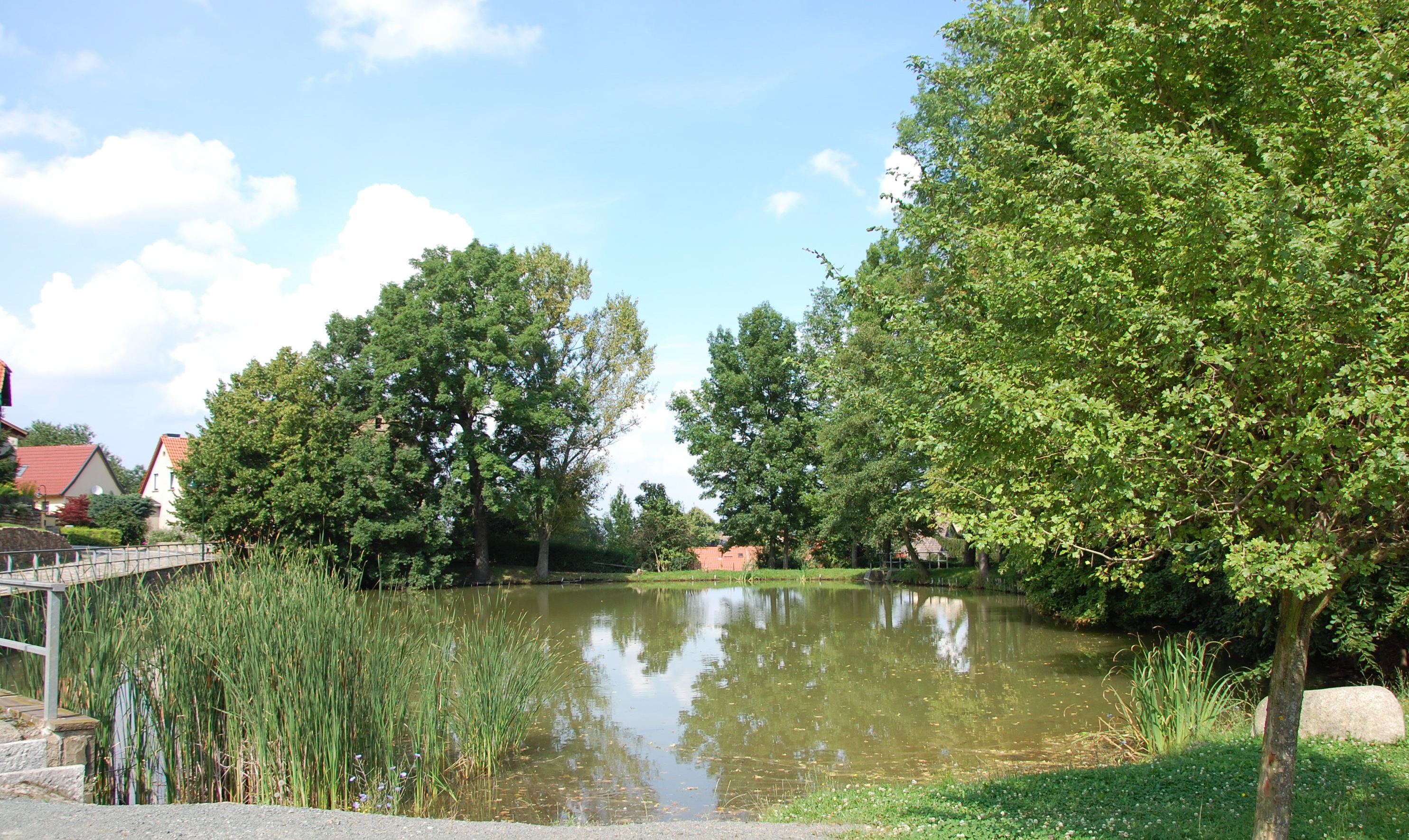 Kunstteich in der Teichstraße in Gernrode